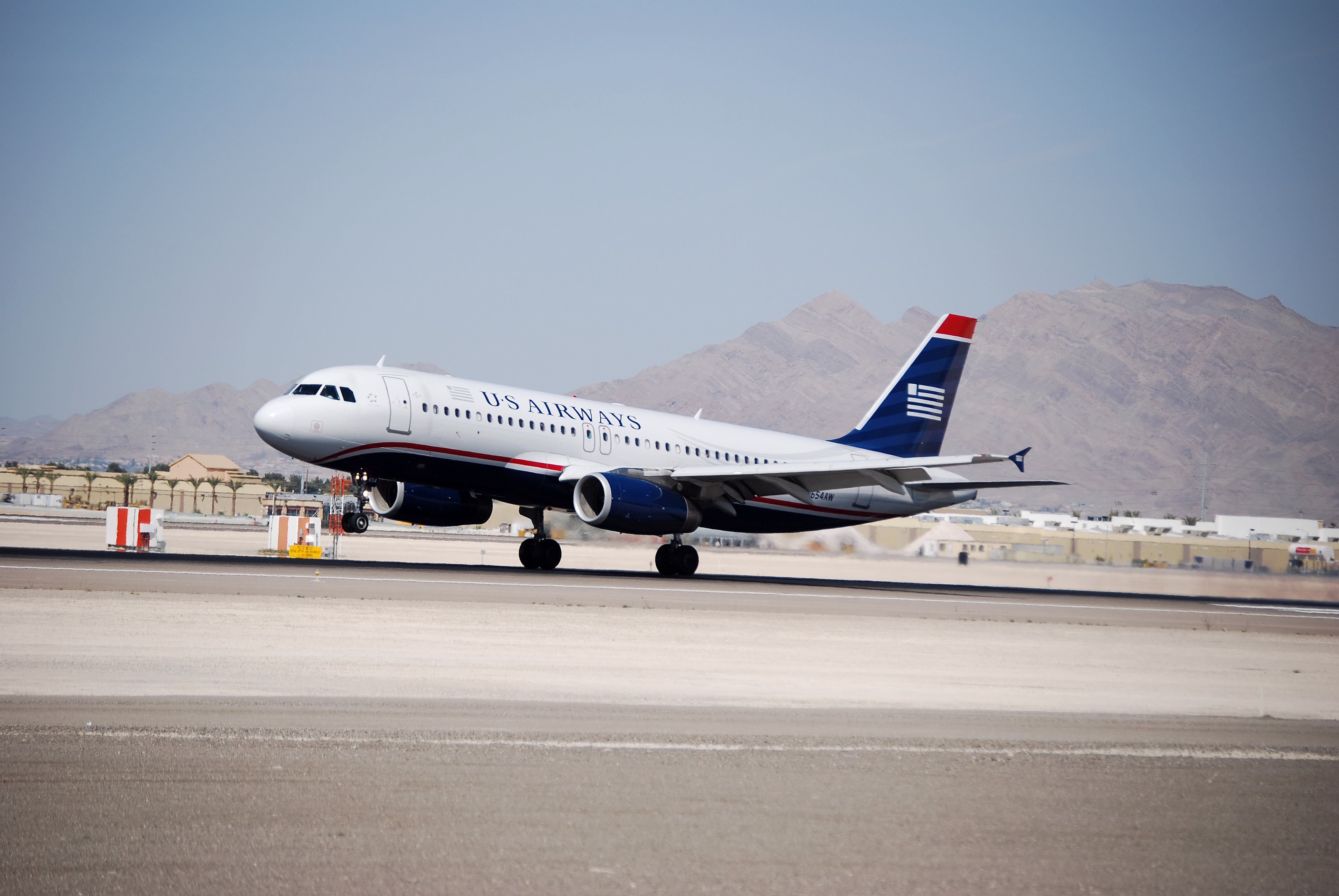 US AIRWAYS A319